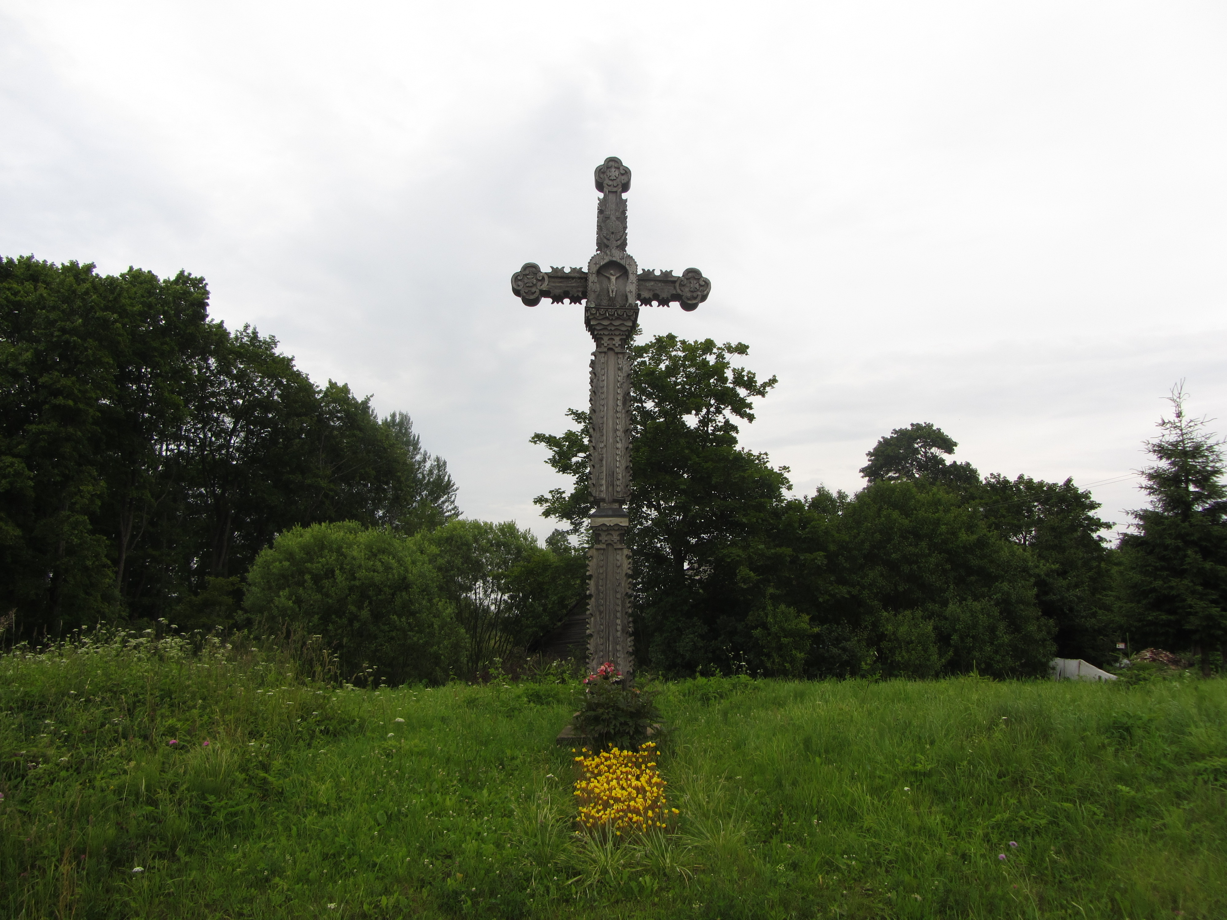 Bajorai, Lithuania